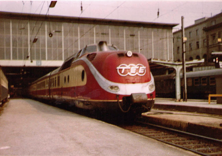 Der TEE stand ca. 1971 in München auf Gleis 14 zur Abfahrt bereit. Vermutlich handelt es sich um den Mediolanum nach Mailand, denkbar ist aber auch der "Hans Sachs" (Dortmund - München) oder der "Prinzregent" (Frankfurt/M - München). Die Baureihe VT 11.5 wurde 1957 eingeführt; die letzten Garnituren fuhren bis 1988. Die TEE-Strecke München - Mailand wurde nur zwischen 1969 und 1972 von dieser Baureihe bedient.